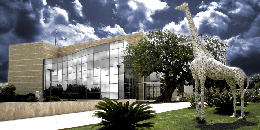 L'Auditori de Torrent.